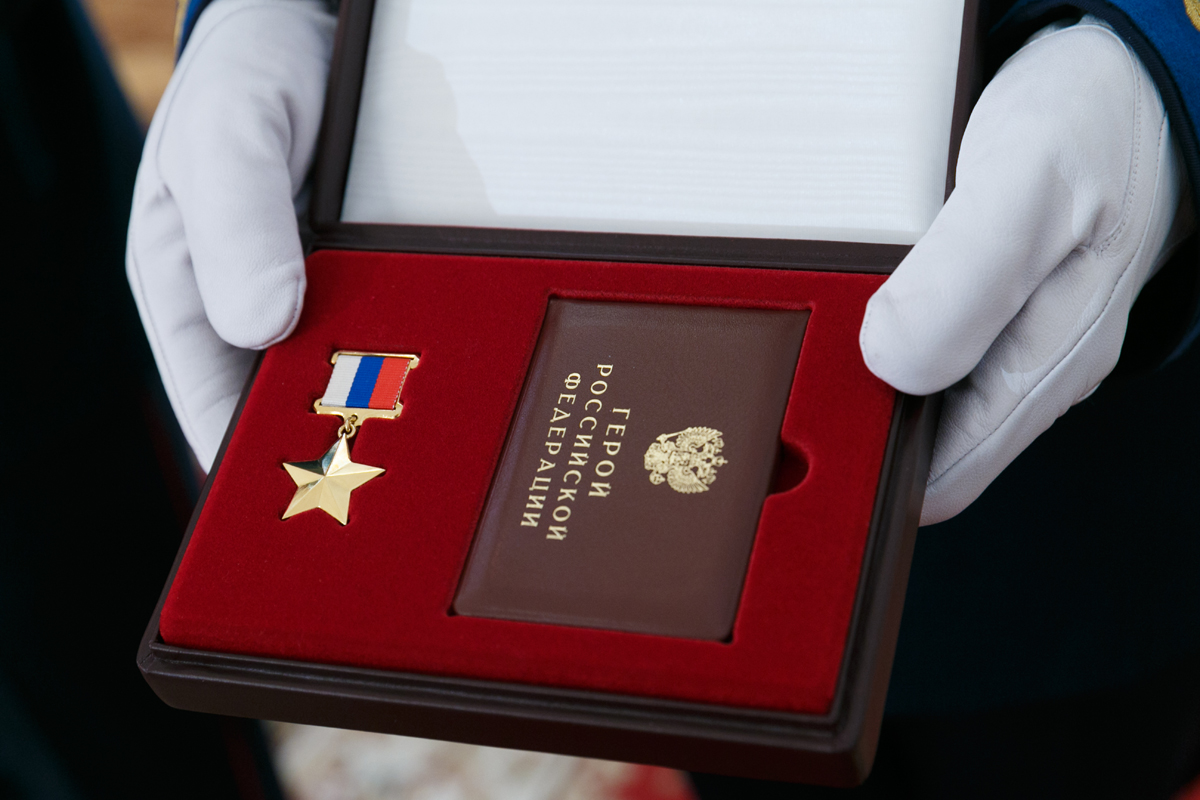 На церемонии вручения государственных наград Российской Федерации, приуроченной к празднованию Дня защитника Отечества. Золотая Звезда Героя России гвардии майора Романа Филипова.